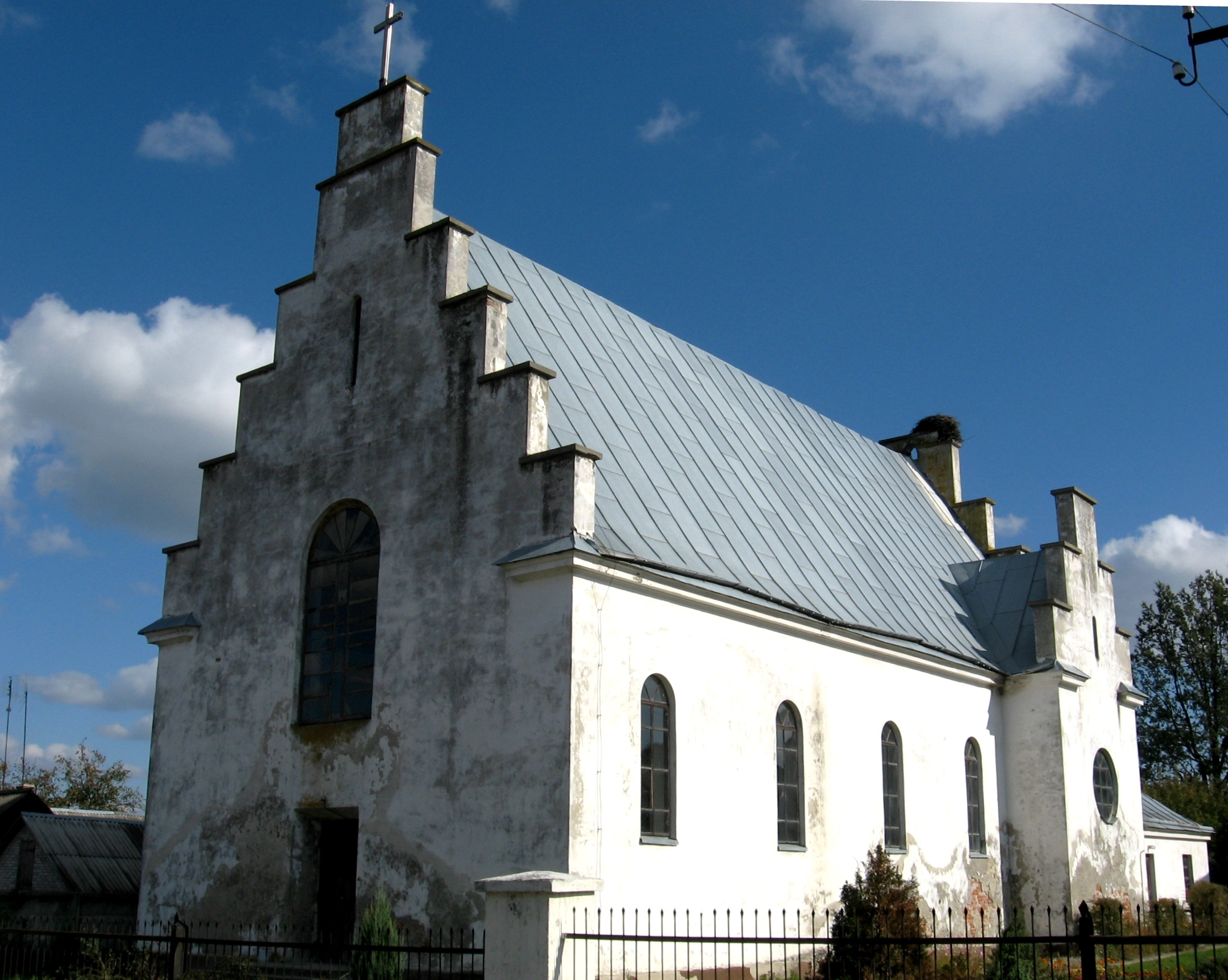 Маневичі. Костел Преображення Господнього